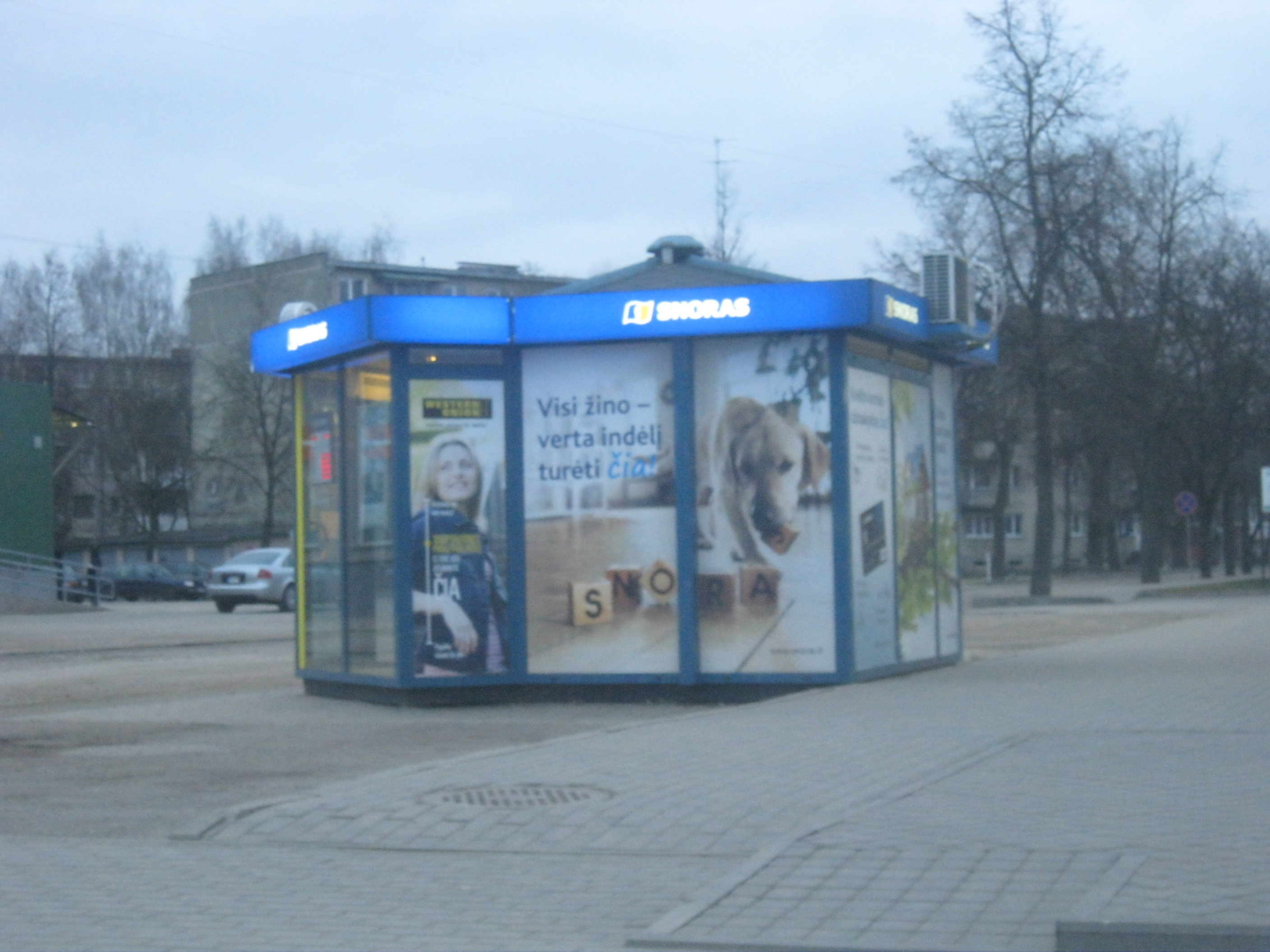 Snoriukas